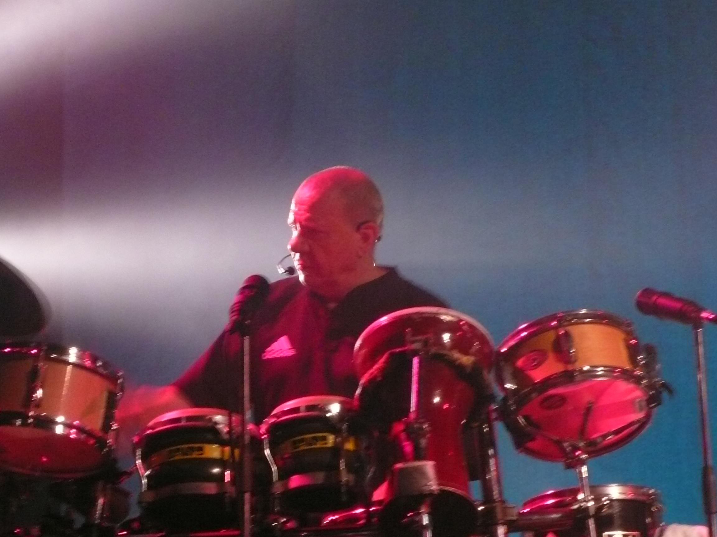 Arcangelo "Kaba" Cavazzuti live live a Villa Ada, a Roma